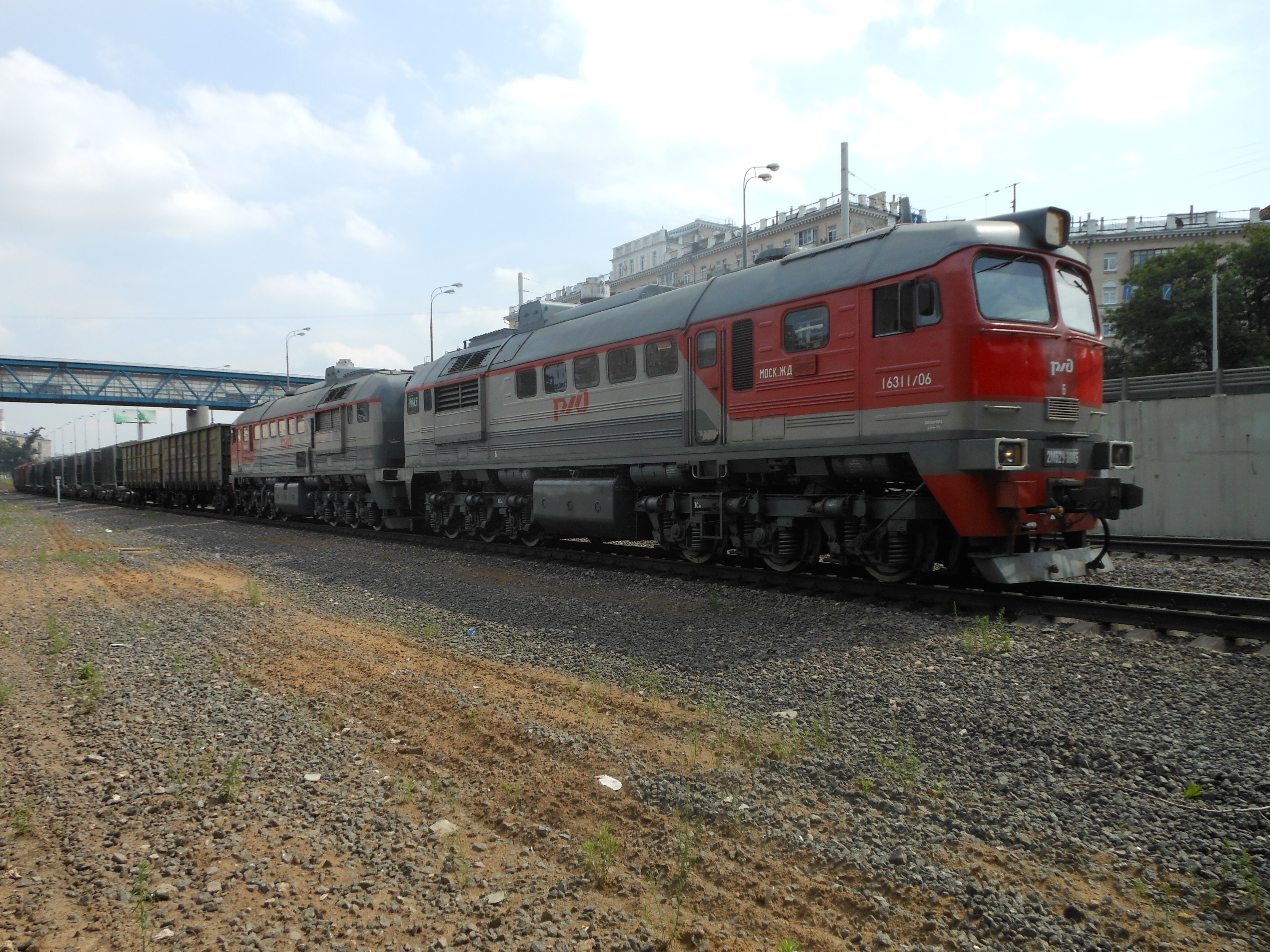 Тепловоз 2М62У-0085 на перегоне Угрешская–Кожухово